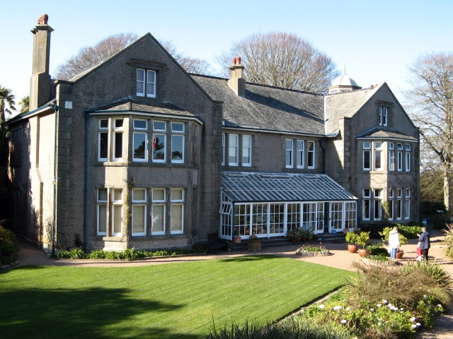 Overbecks, National Trust Gardens and Museum